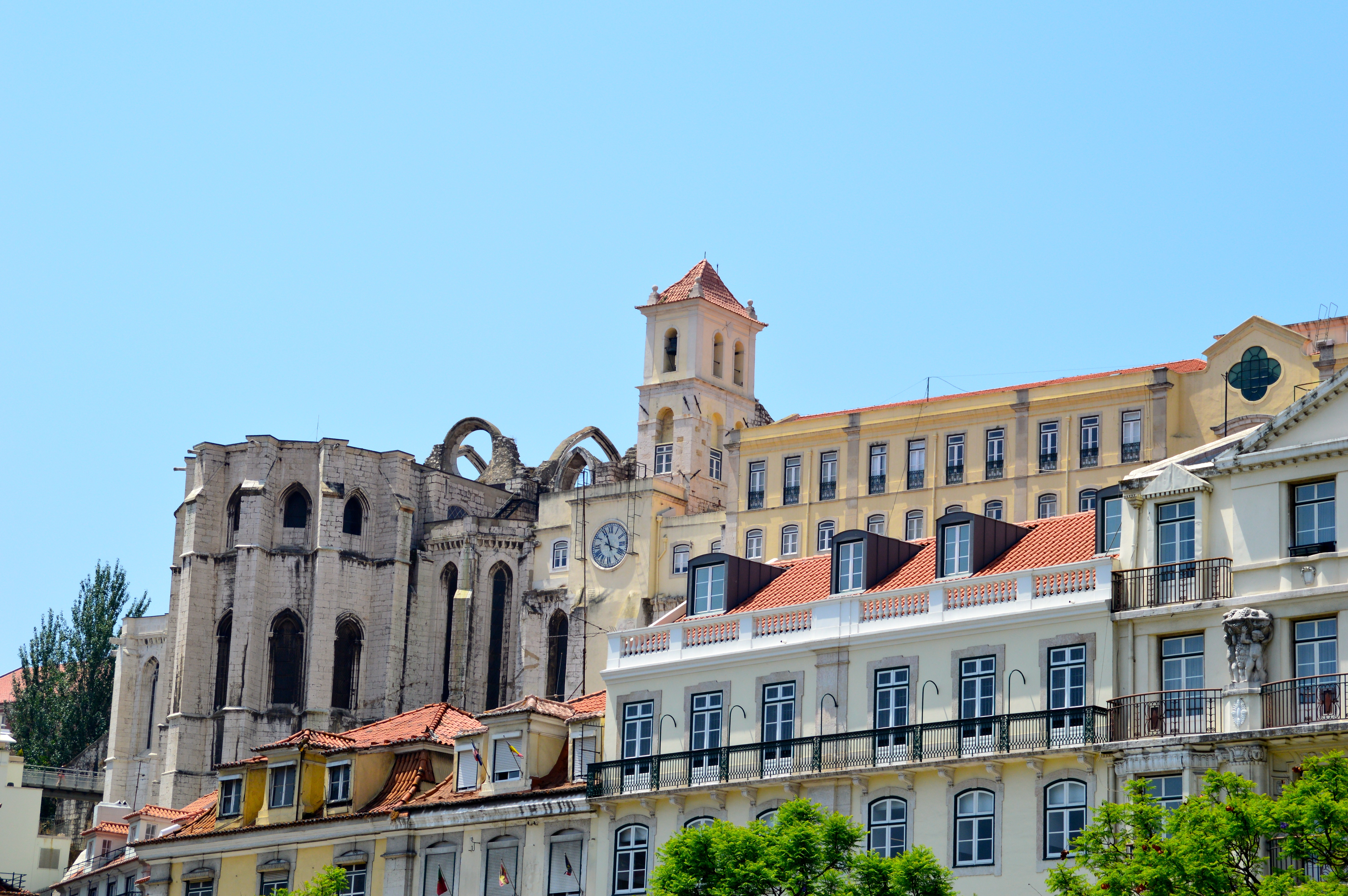 Couvent des Carmes